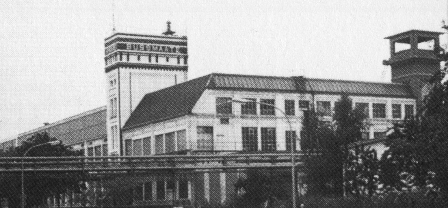 Textilfabrik Rawe um 1970, Nordhorn